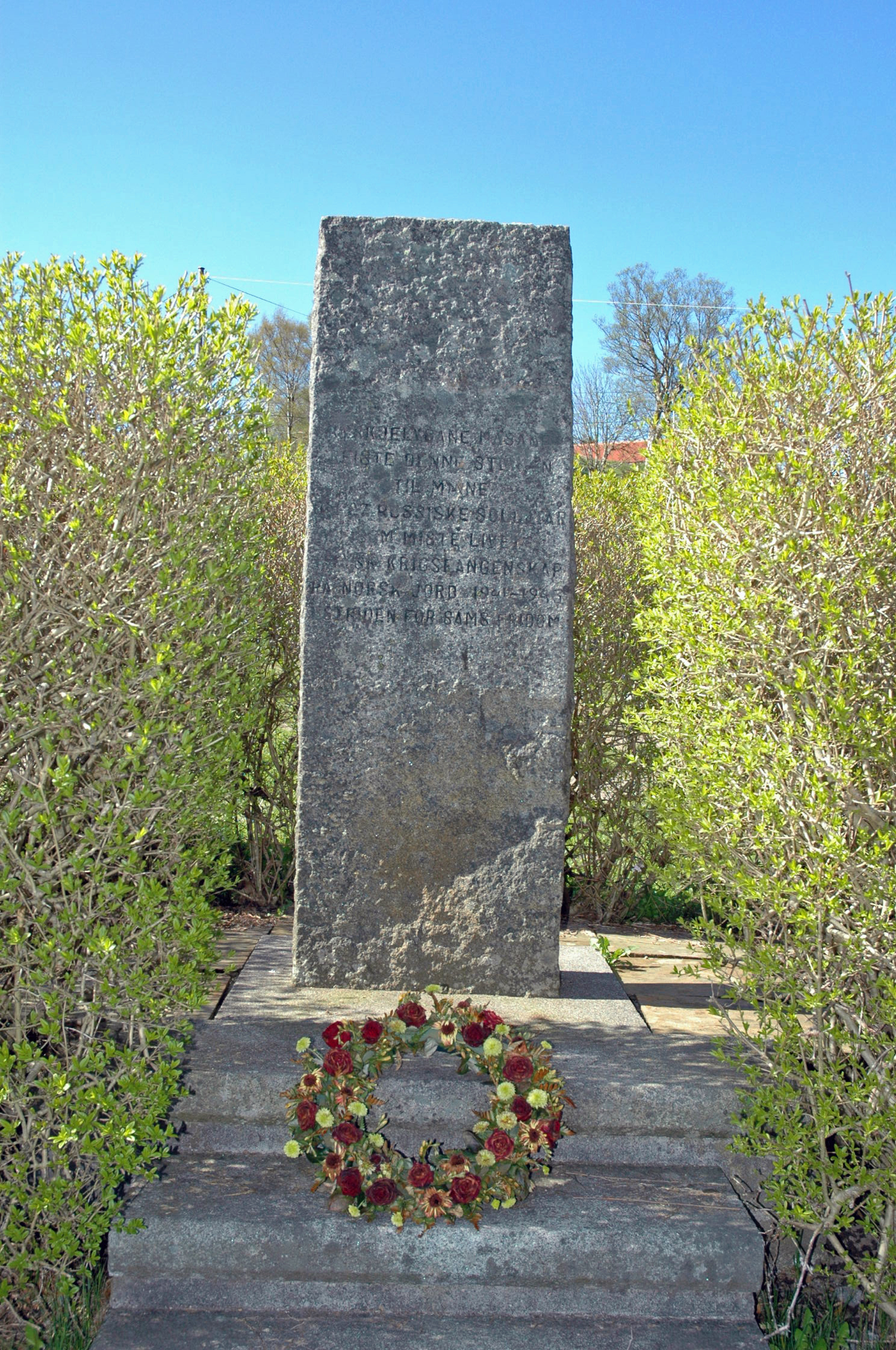 Minnestein ved Åsane kirke